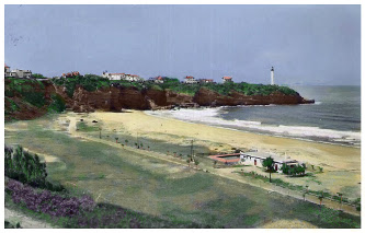 la petite chambre d'amour à Anglet (64600) avant le vvf